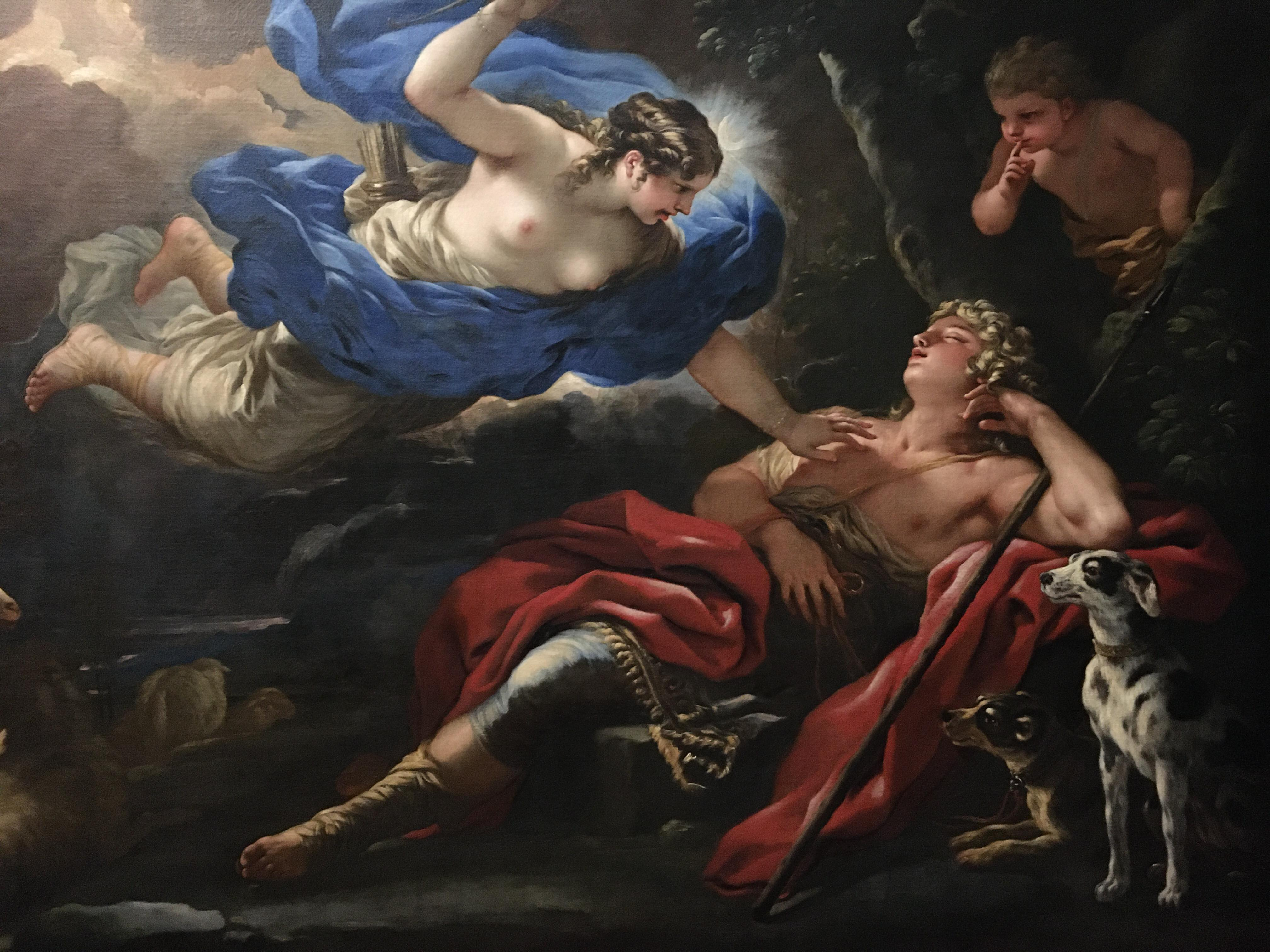 Photo prise lors de ma visite à l'exposition au Petit Palais en février 2020.